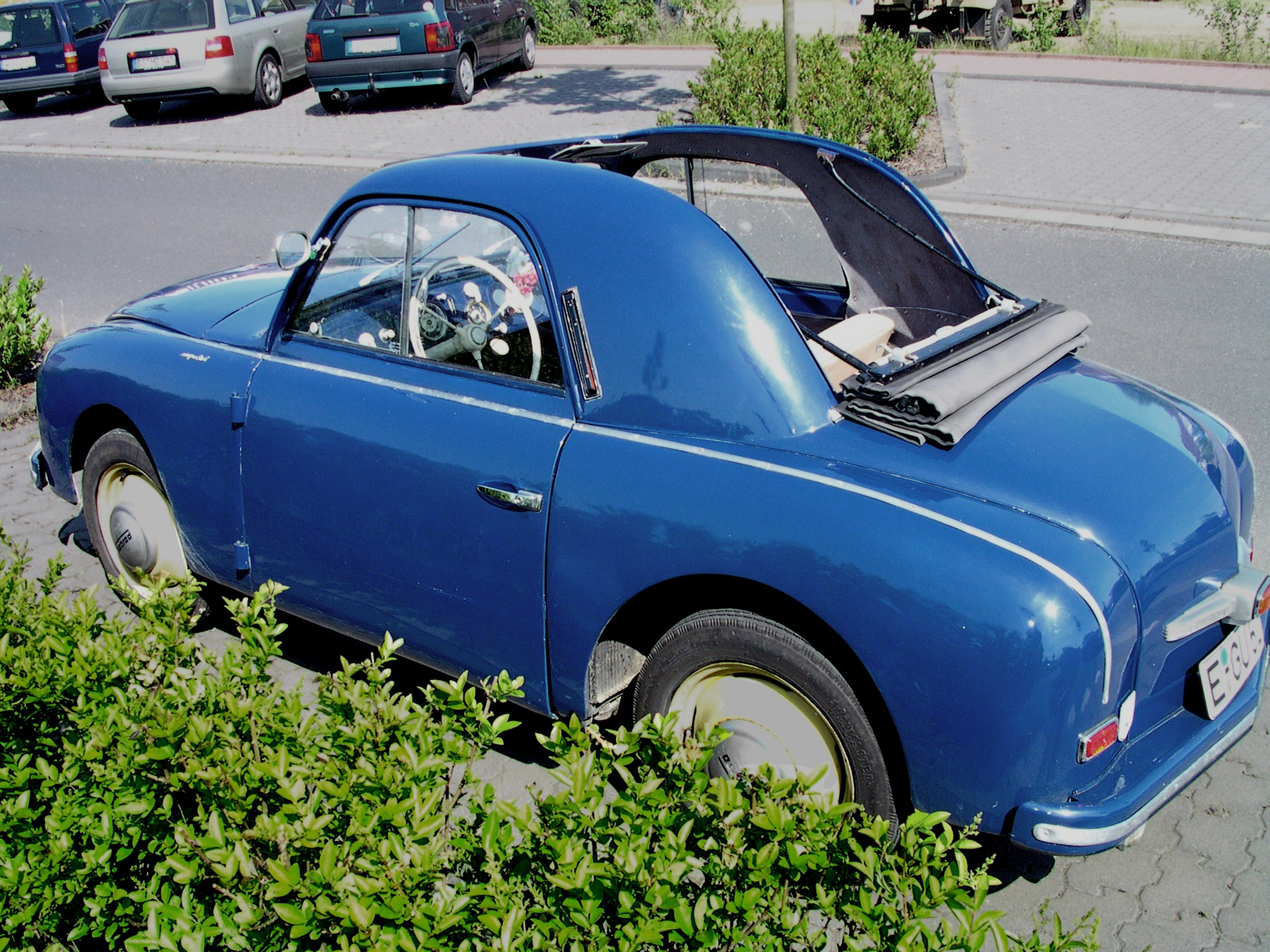 Willich, Borgward-Treffen im LKW-Museum, Gutbrod Superior